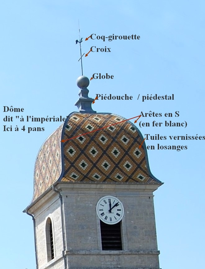 Description d'un clocher comtois type avec son dôme à l'impériale (église de Châtelneuf, département du Jura)